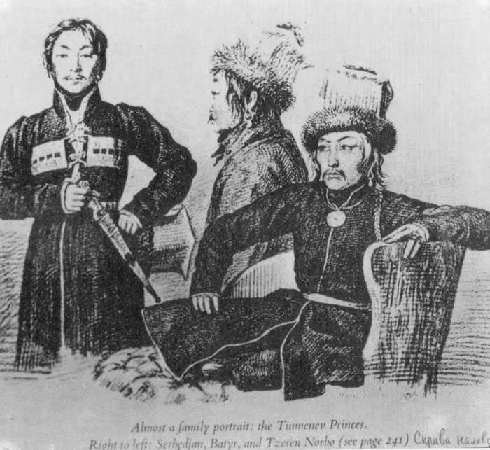 Калмыцкие князья Тюменевы - братья Серебджаб, Батыр и Цзерен Норбу. Гравюра из книги 19 века, по рисунку, выполненному с натуры.